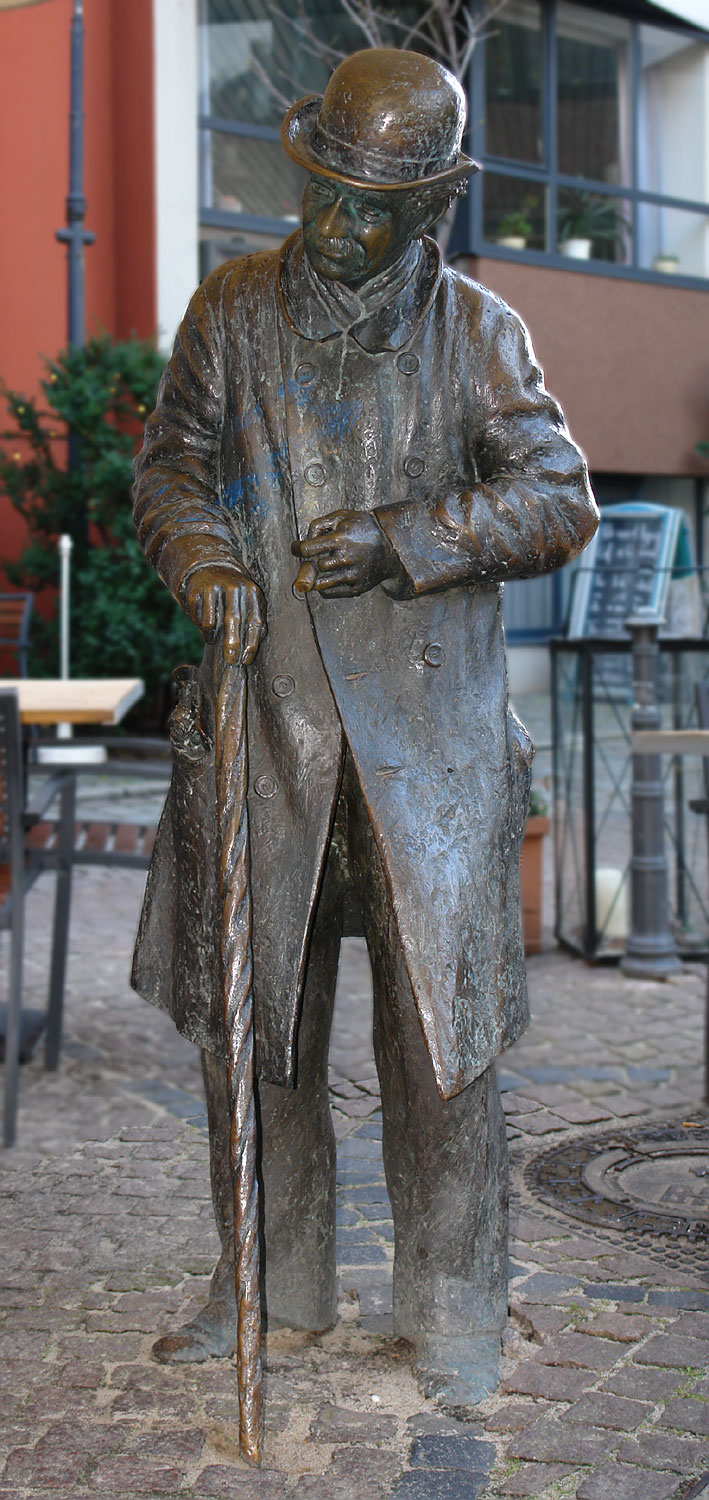 Das Heini-Holtenbeen-Denkmal im Schnoorviertel in Bremen, Deutschland. Das bronzene Denkmal wurde 1990 von dem deutschen Bildhauer Claus Homfeld zur Erinnerung an das Bremer Original Jürgen Heinrich Keberle (*18.4.1835, †13.9.1909), genannt Heini Holtenbeen, geschaffen.